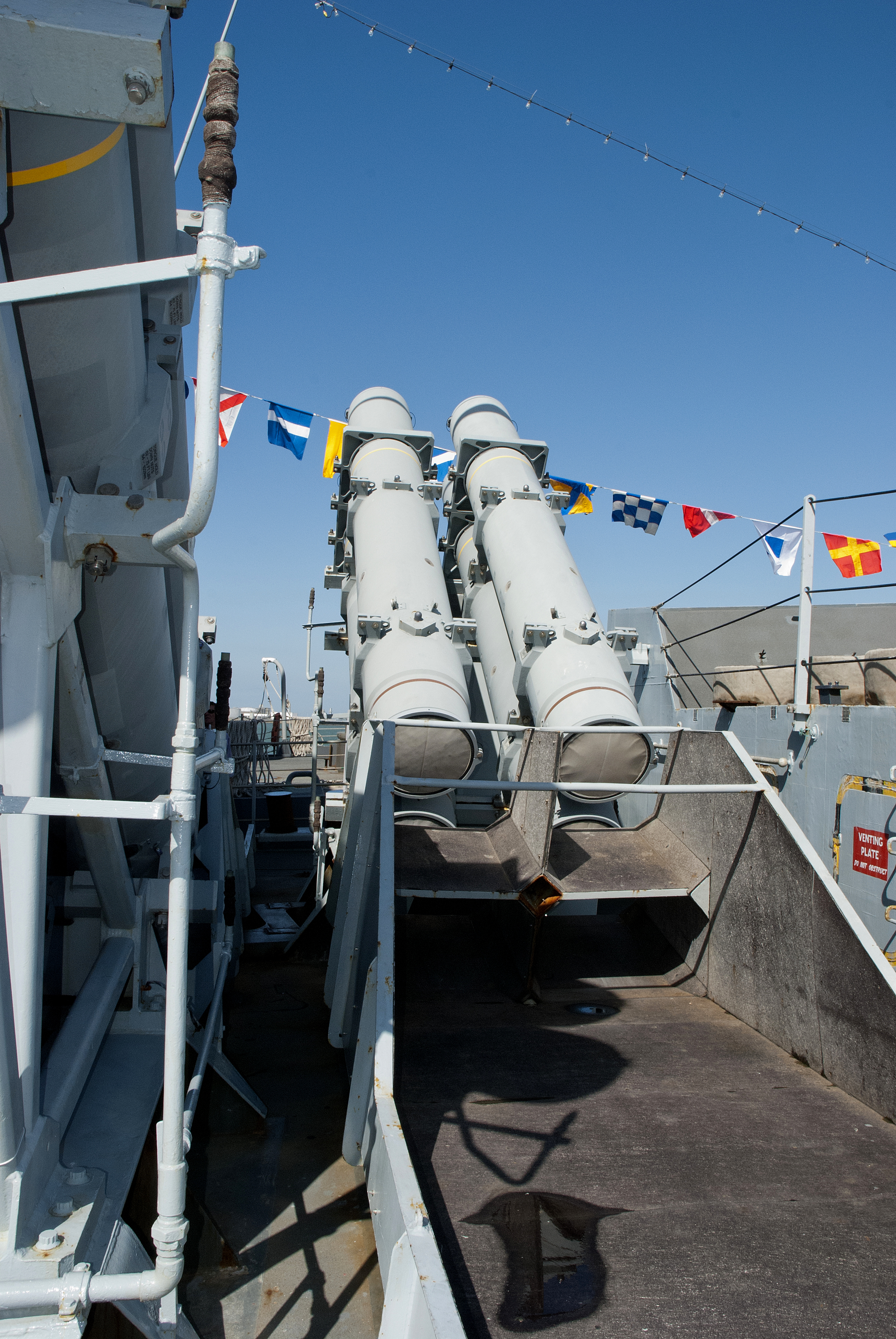 Harpoons aan boord van de HMS Argyll tijdens de Navydagen Zeebrugge 2009